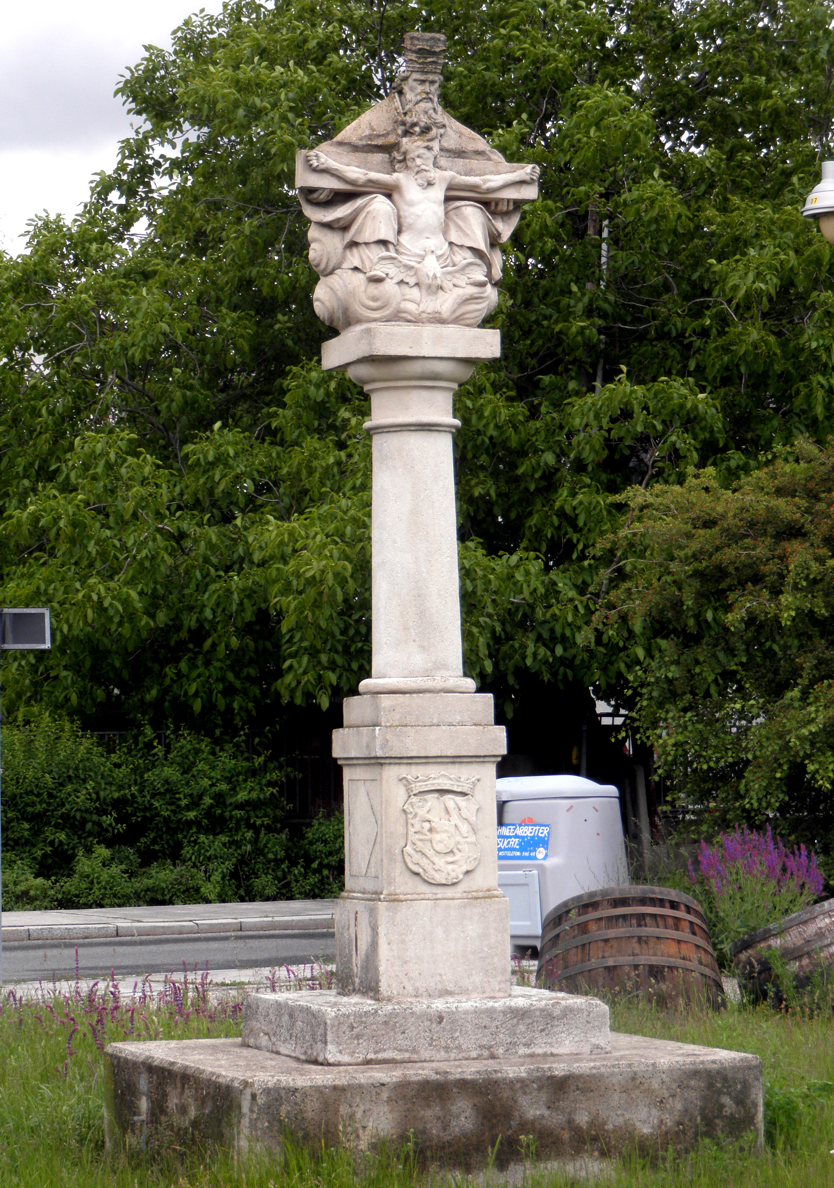 Dreifaltigkeitssäule